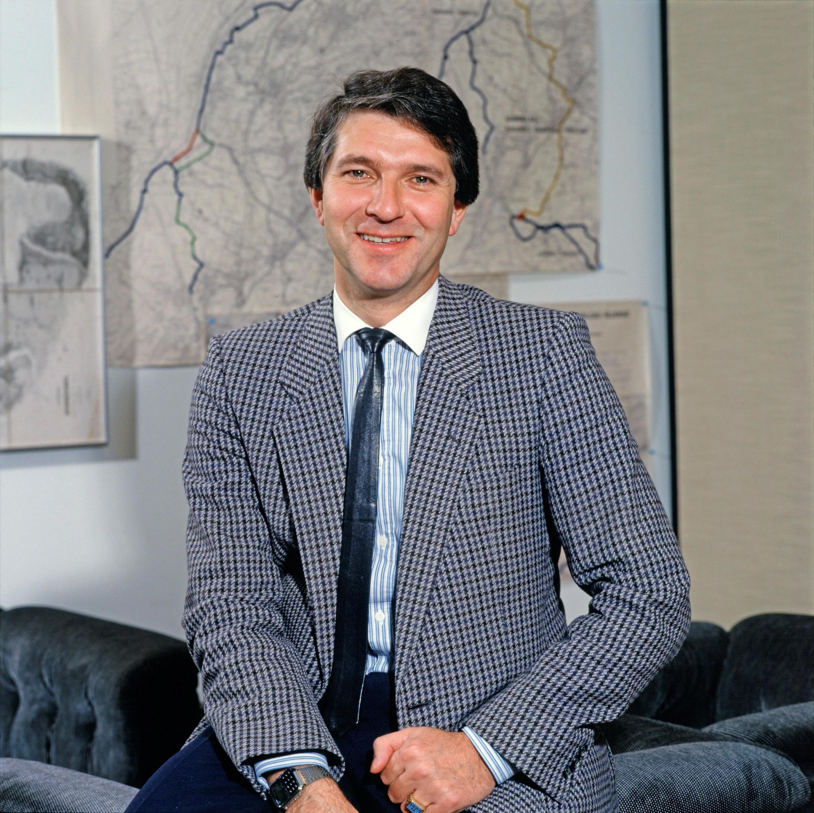 Hans-Dieter Grabher war Landesrat in der Vorarlberger Landesregierung von 1984 bis 1994. Dies ist eine offizielle Portraitaufnahme vom 12. November 1984